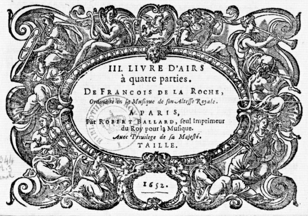 Title page of François de La Roche, Airs, Livre III (Paris, 1652).Paris BNF.